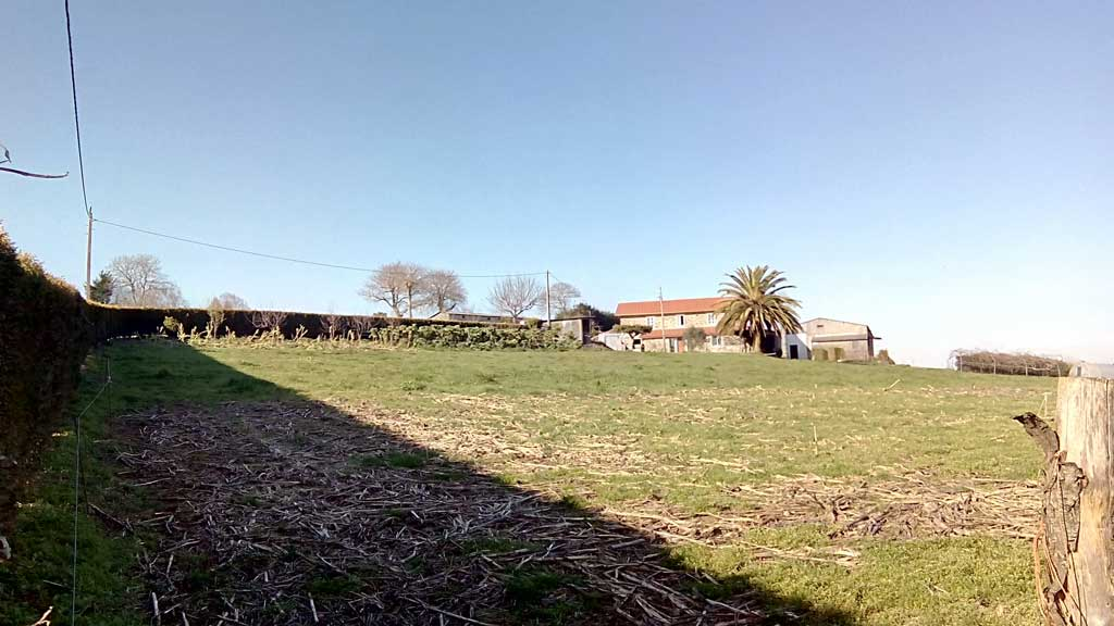 Vista do Castro, Vizoño Abegondo.